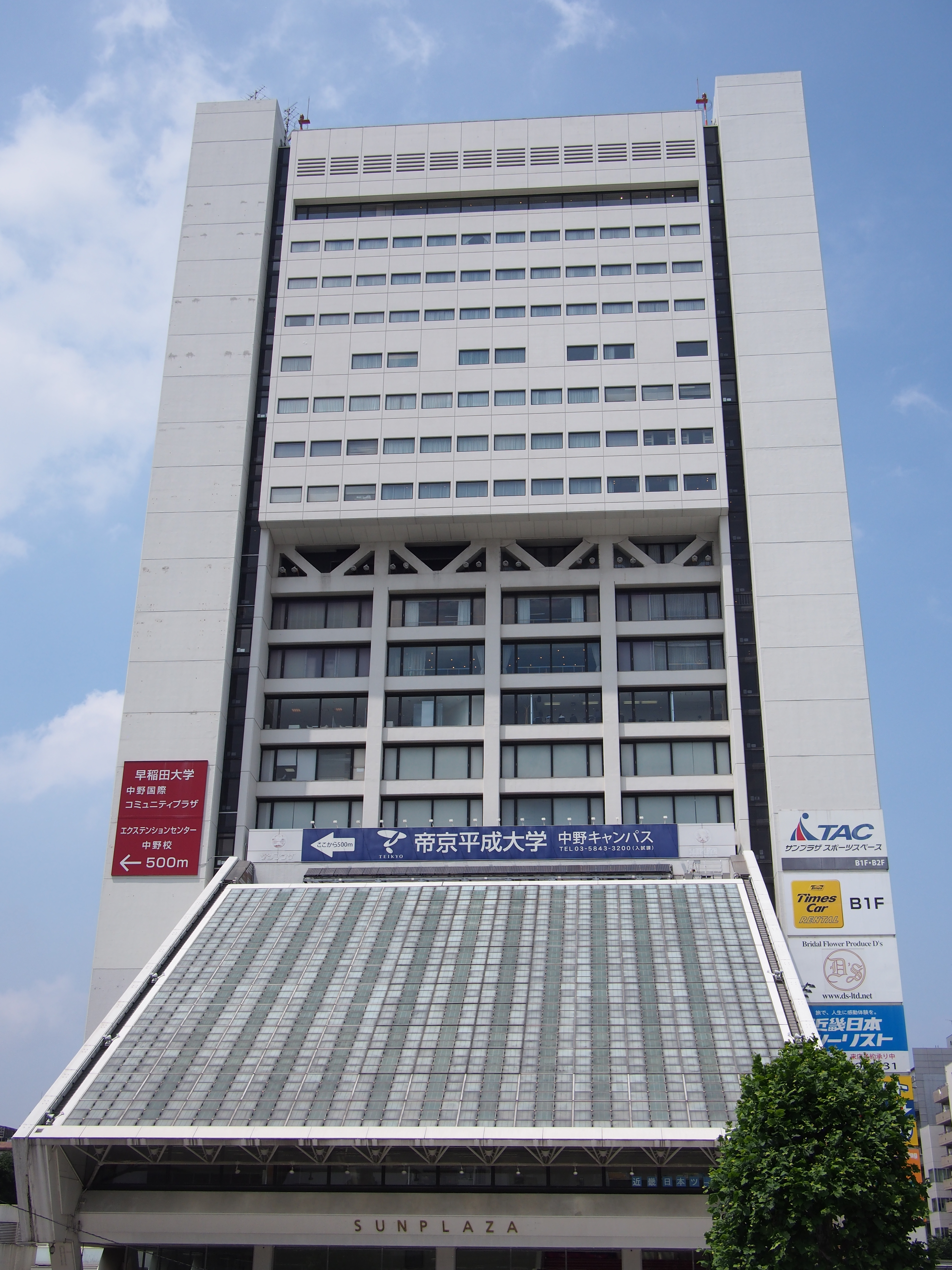 Nakano sunplaza